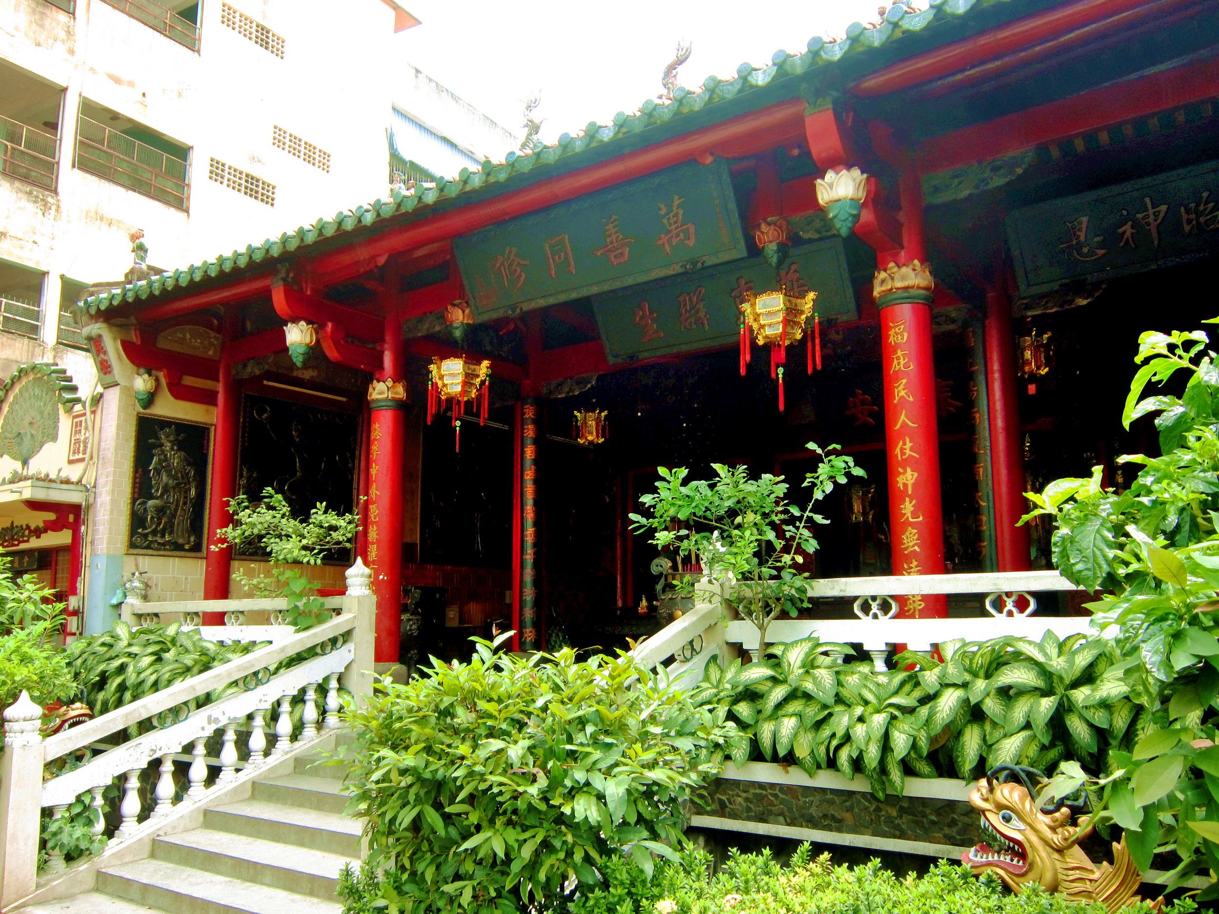 Miếu Nhị Phủ là một ngôi miếu cổ do người Hoa xây dựng vào khoảng đầu thế kỷ 18. Hiện ngôi miếu tọa lạc tại số 264 đường Hải Thượng Lãn Ông, phường 14, quận 5, Thành phố Hồ Chí Minh, Việt Nam.